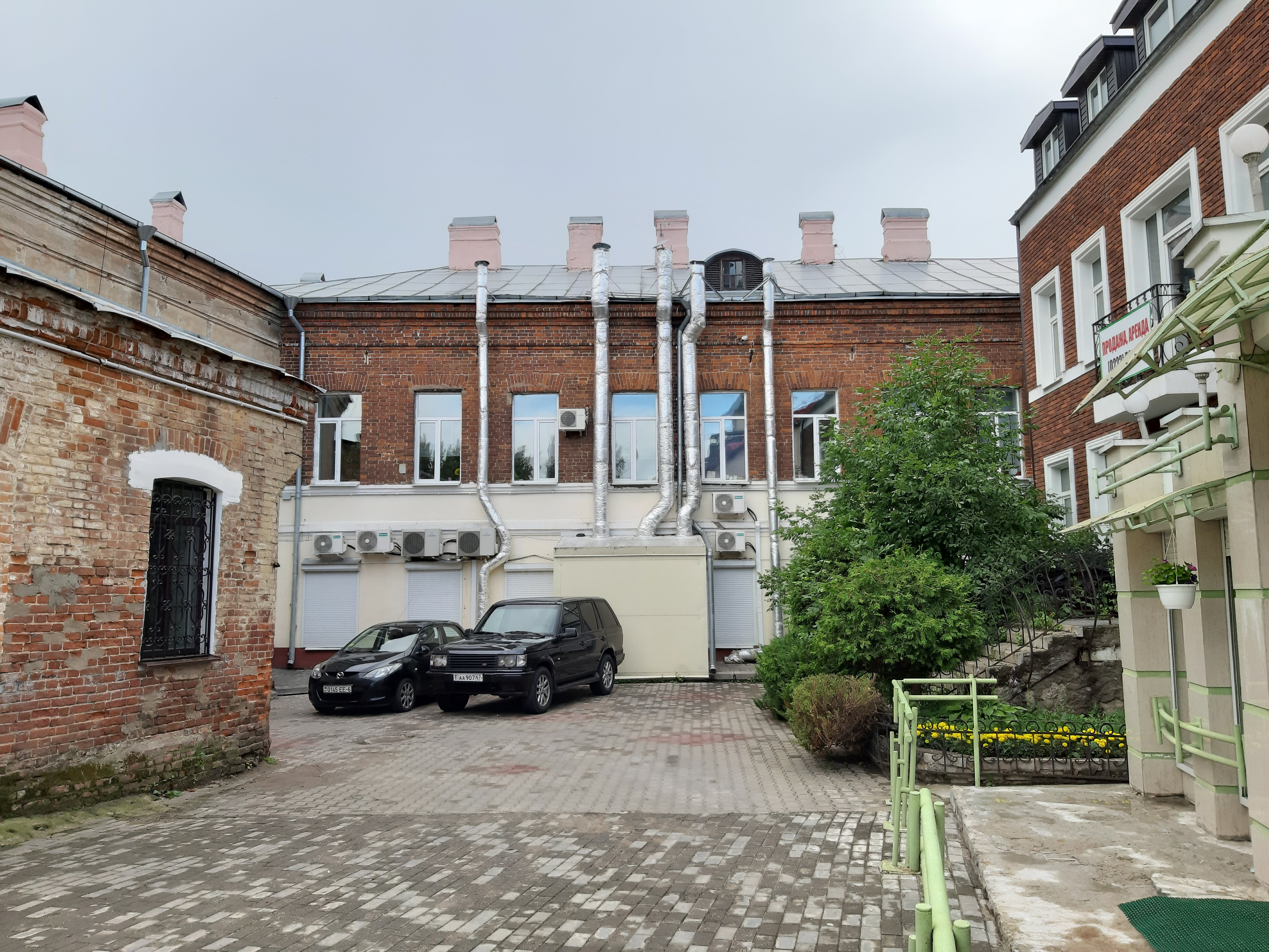 Магілёў. Двары Пажарнага завулка